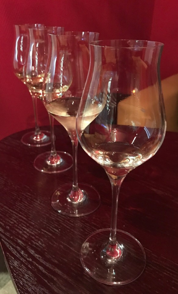 리즐링 와인